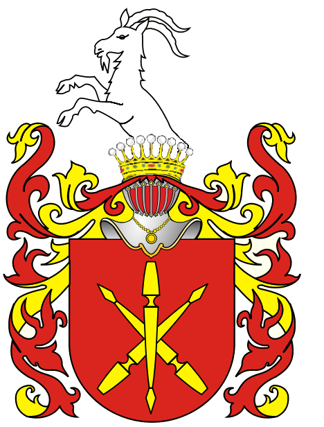 Hern Jelita (hrabia)